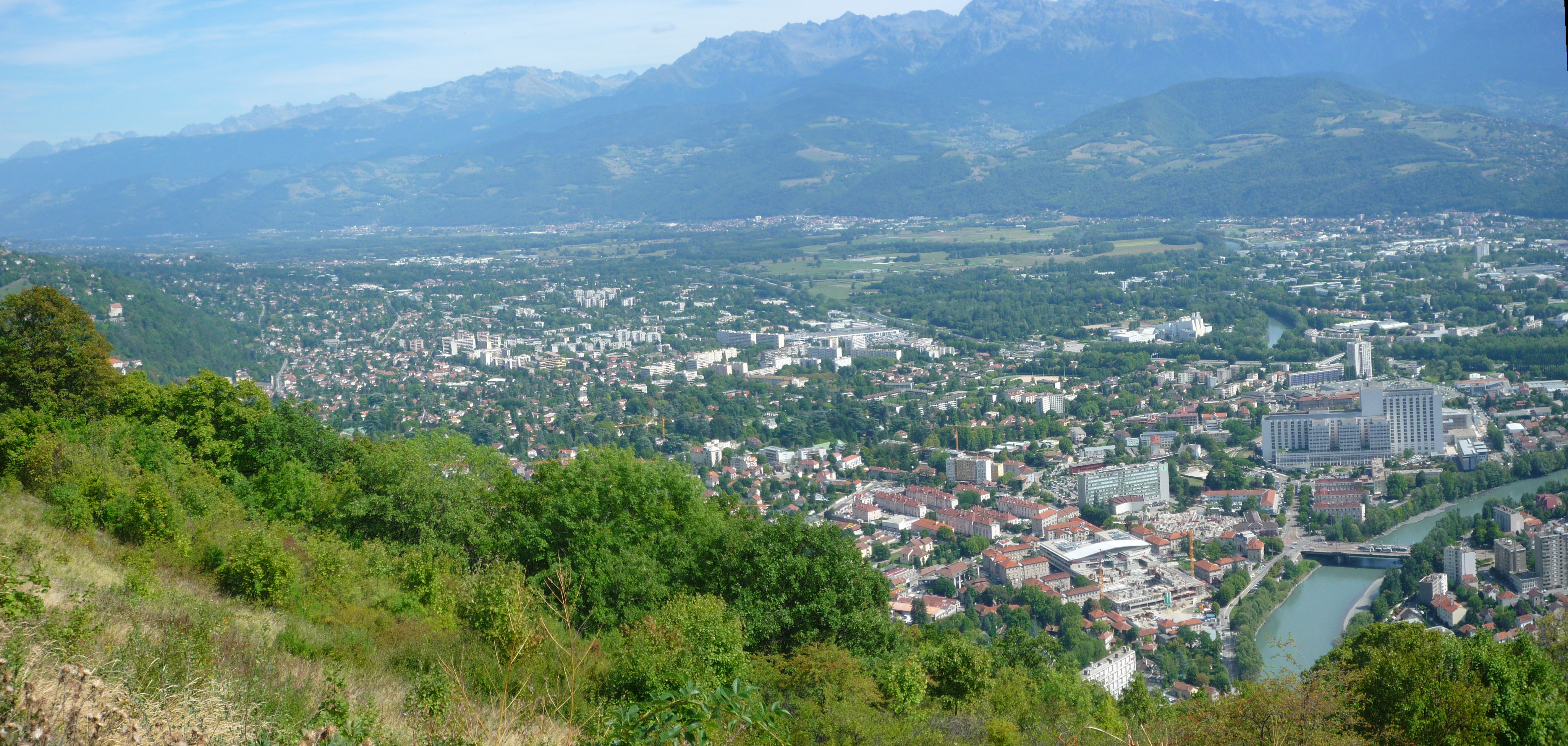 Au premier plan, ville de La Tronche, près de Grenoble.